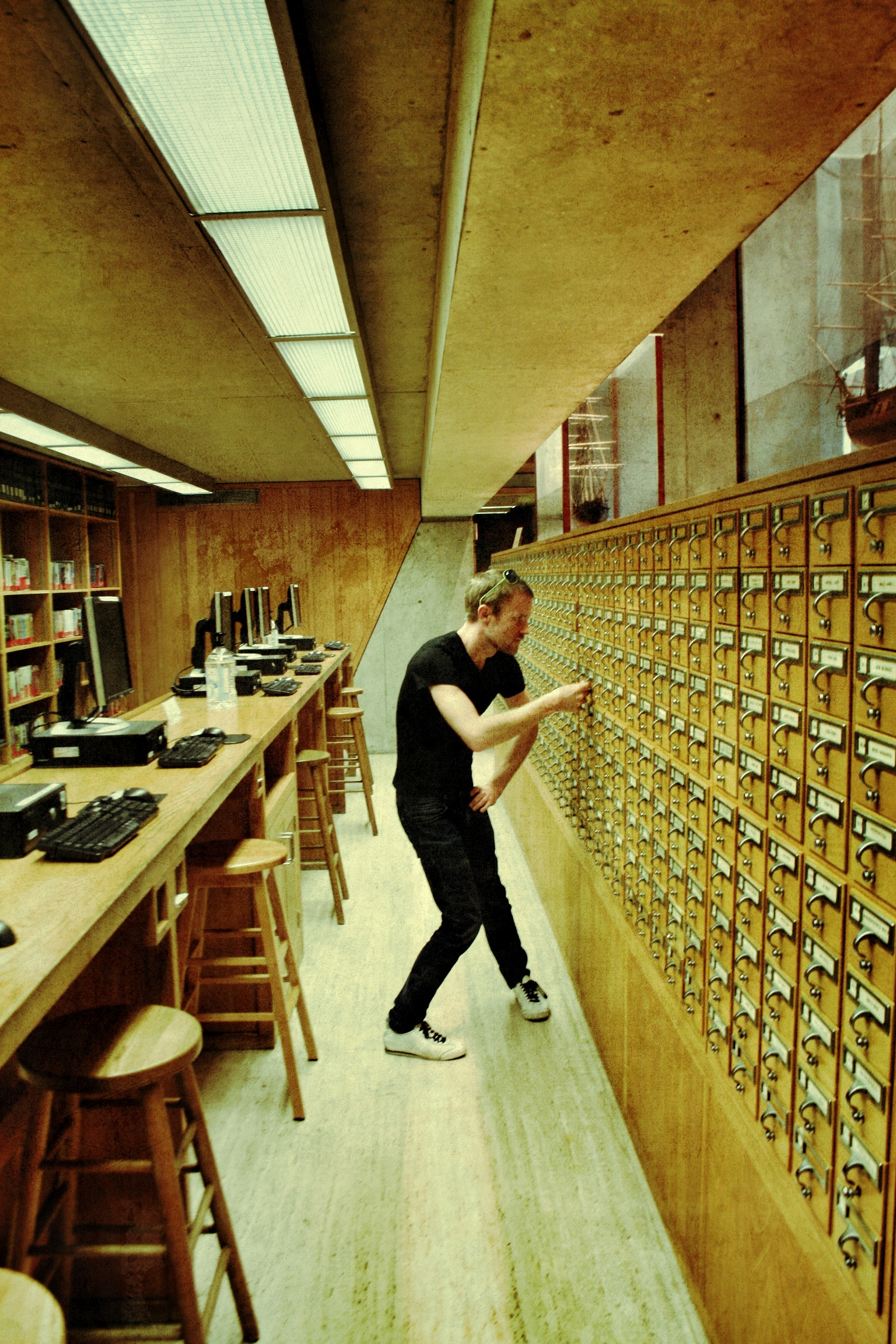 card catalog